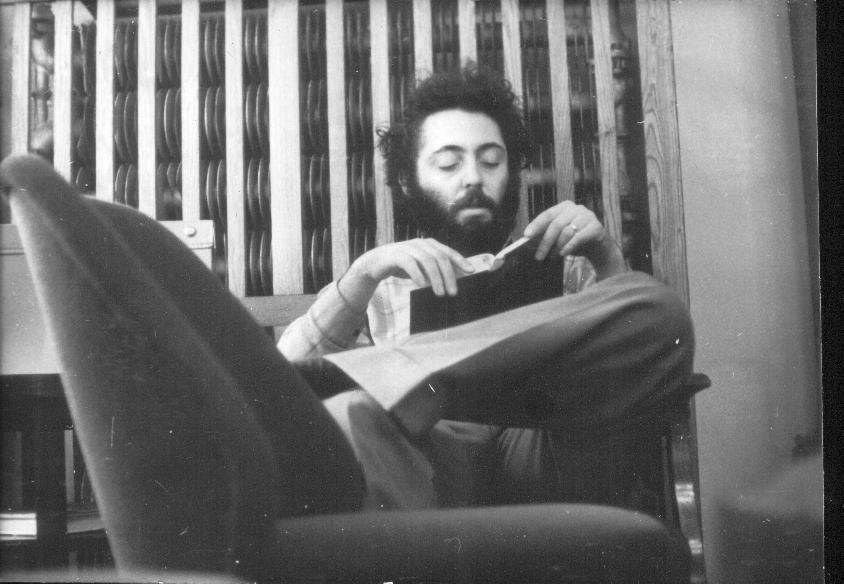 studentenpfarrer Hans-Joachim Vogel in Karl-Marx-Stadt, jetzt Chemnitz